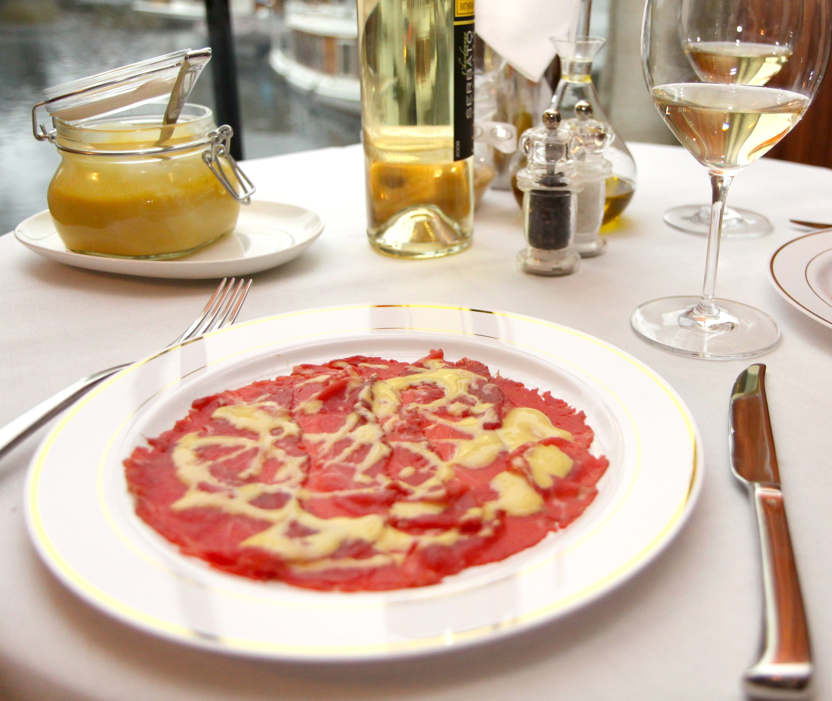 Carpaccio „Cipriani“ – Carpaccio (vom Rinderfilet) nach dem Originalrezept von Giuseppe Cipriani, dem Gründer von Harry’s Bar in Venedig; mit der Original-„Universalsauce“ von Cipriani.